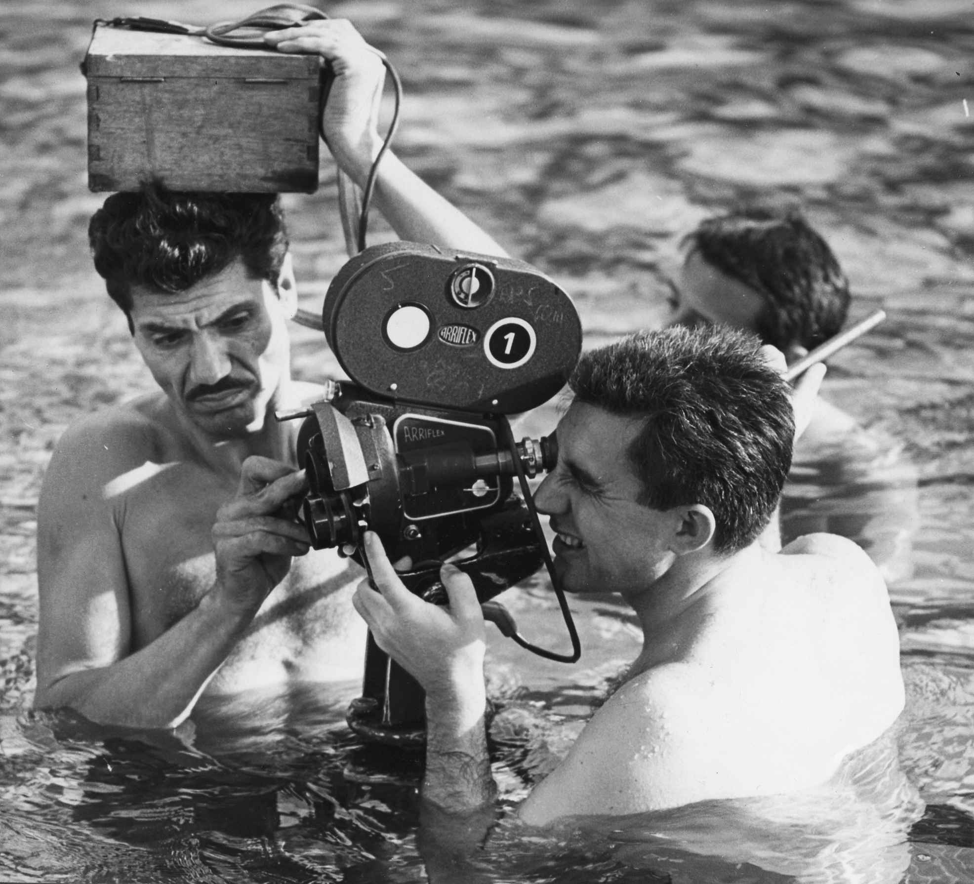 az MTV forgatásán Várszegi Károly és Kocsis Sándor operatőrök. Location: Hungary Tags: Hungarian TV Title: az MTV forgatásán Várszegi Károly és Kocsis Sándor operatőrök.